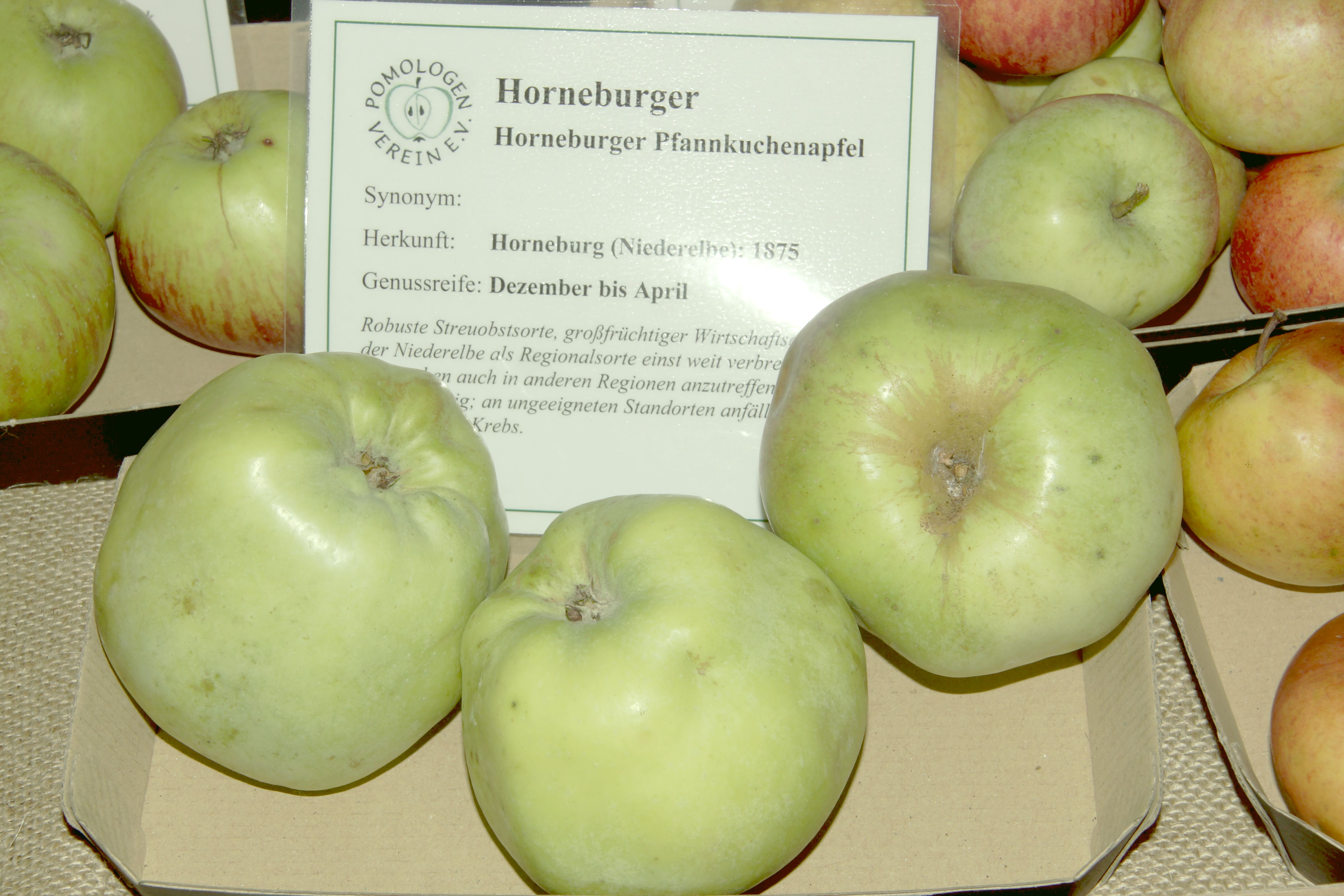 Horneburger (auch Horneburger Pfannkuchenapfel), Herkunft Niederelbe um 1875